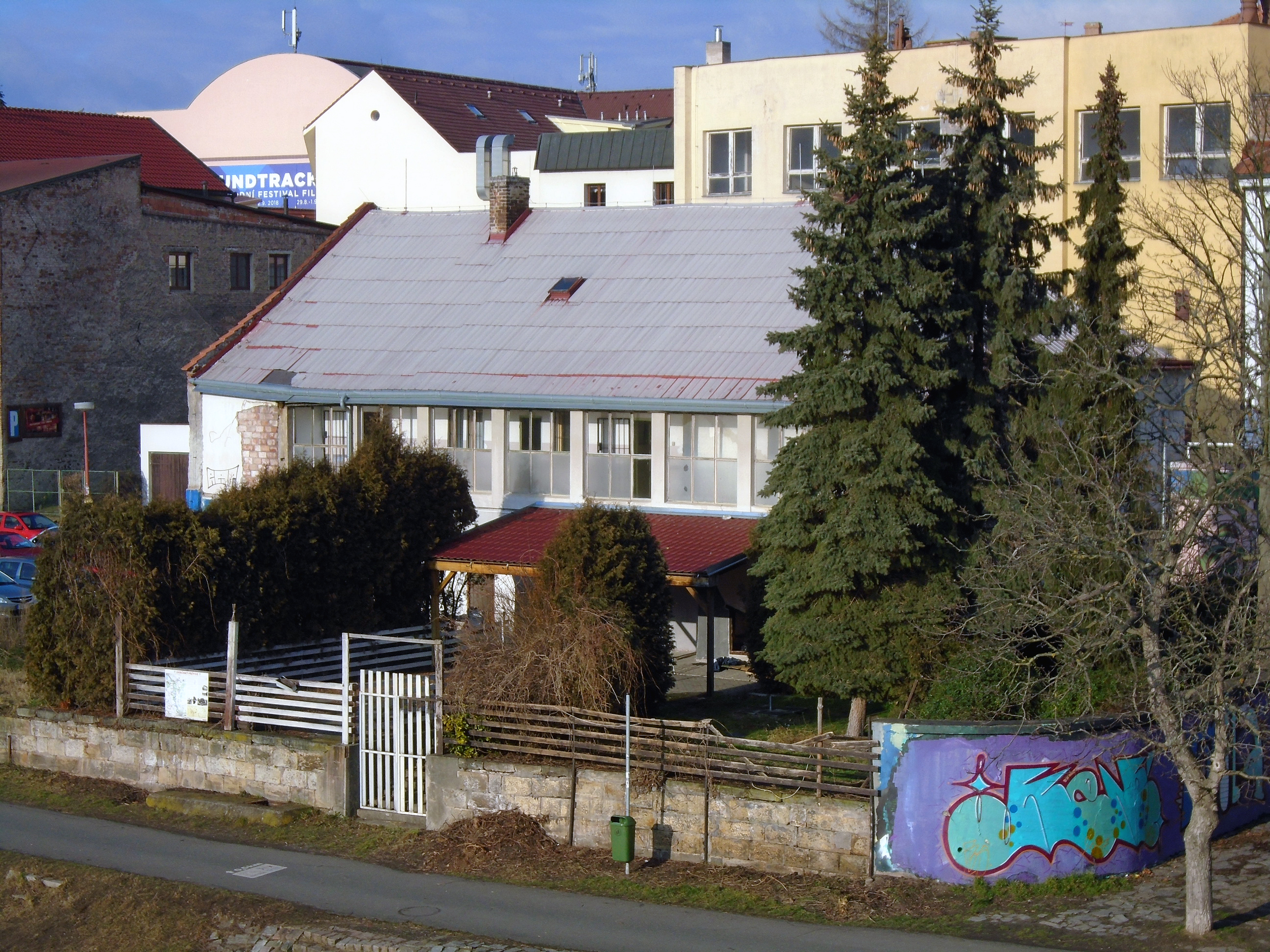 Bývalý poděbradský Paroubkův chudobinec. V pozadí žlutá budova bývalých jatek a růžová budova obchodního domu (Růžový slon), původně monstrózního socialistického kulturního domu.